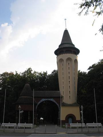 Palić